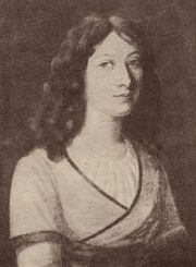 Charlotte von Lengefeld, Ölgemälde von Ludovika Simanowitz, 1794.